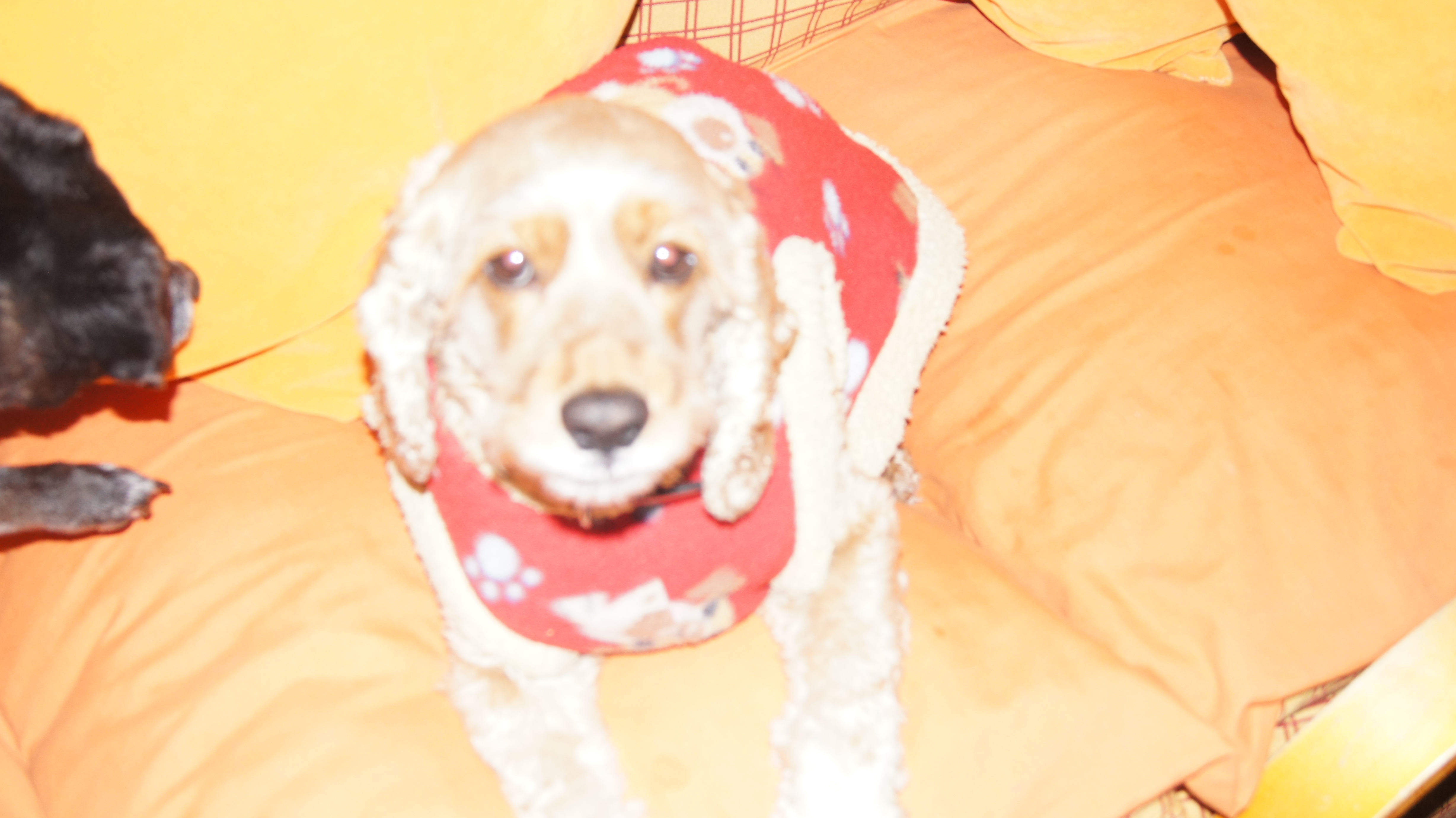 Cocker